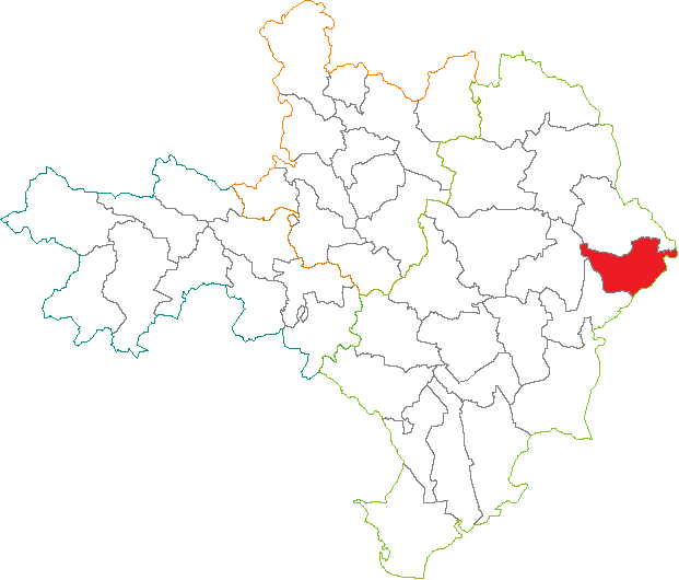 Situation du canton dans le département du Gard (France)